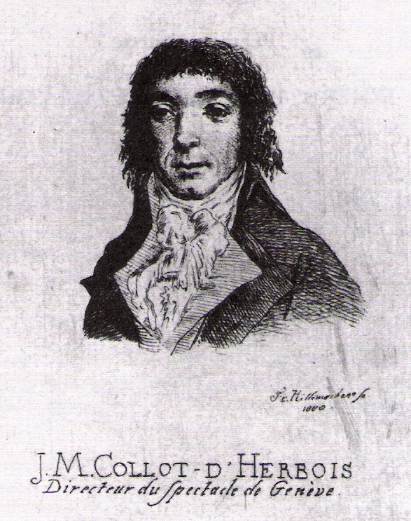 J.-M. Collot d'Herbois. Directeur du spectacle de Genève.